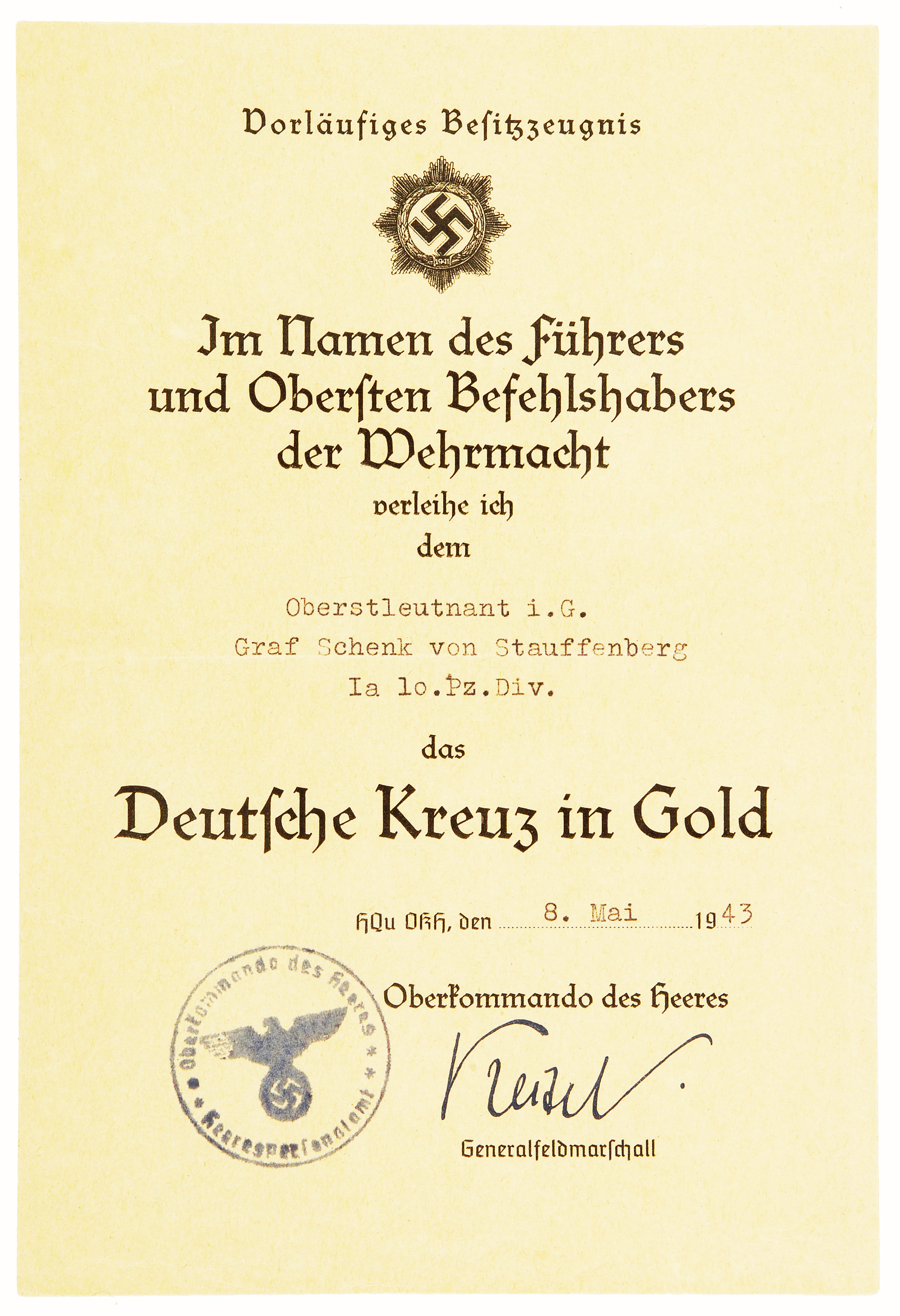 Verleihung des Deutschen Kreuzes in Gold an Oberstleutnant i. G. Claus Graf Schenk von Stauffenberg, 1943 (StAS Dep. 38 T 4 Nr. 376)